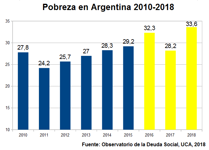 Pobreza en Argentina 2010-2018. Fuente: Observatorio de la Deuda Social, Universidad Católica Argentina, 2018